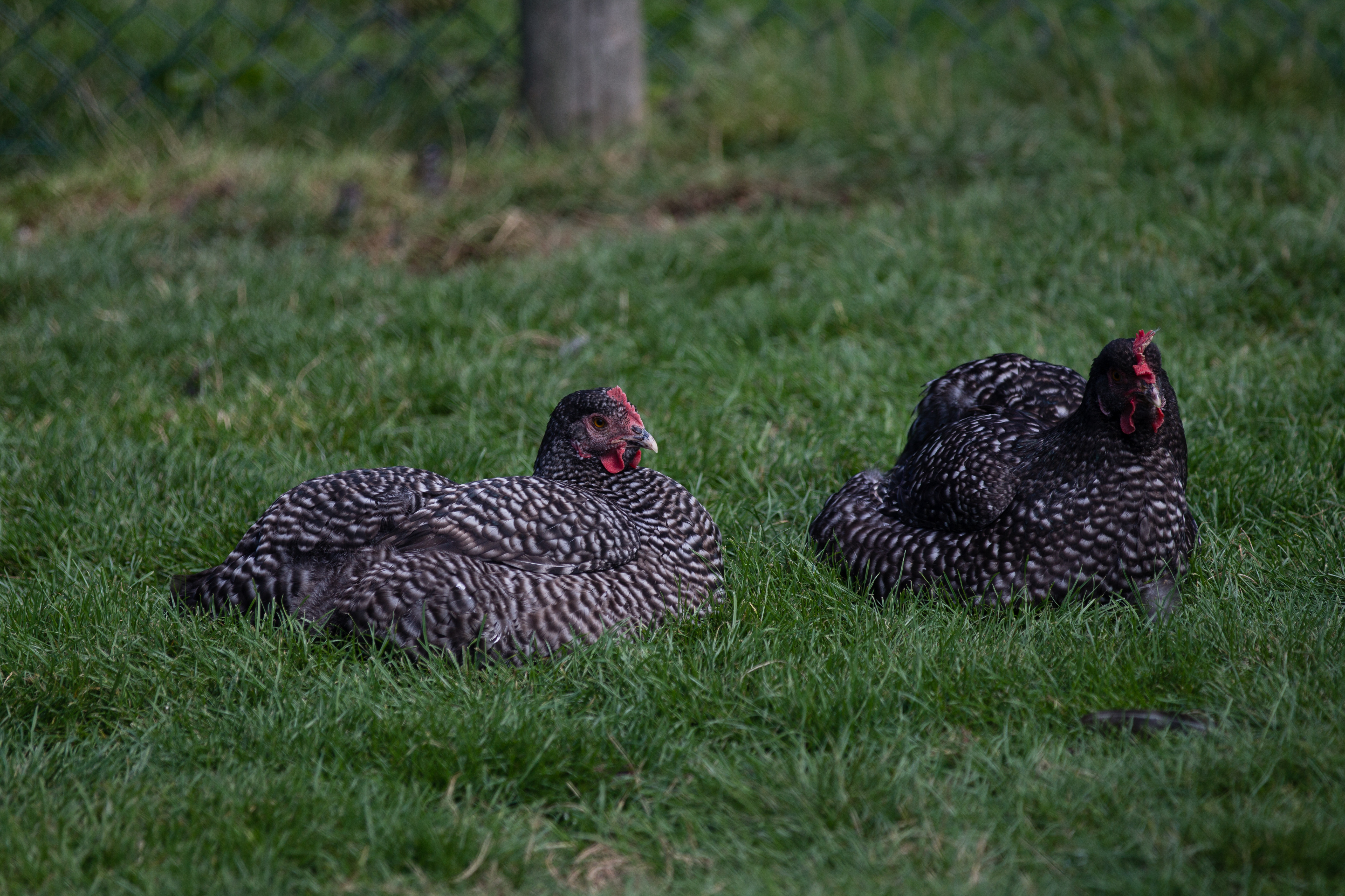 Poule coucou de Rennes à l'Écomusée du pays de Rennes.